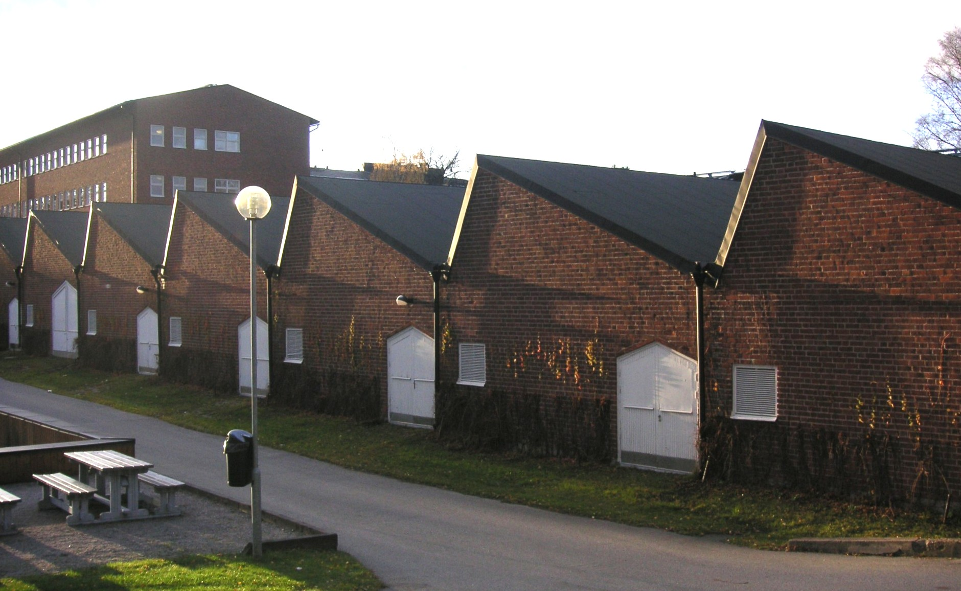 Ett sågtandat tak